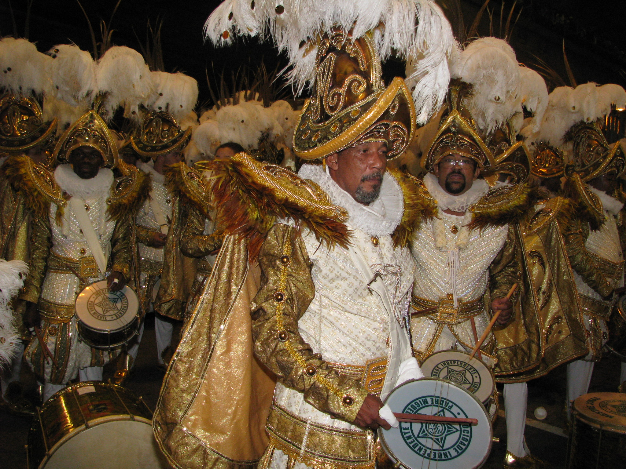 Mocidade-04.JPG